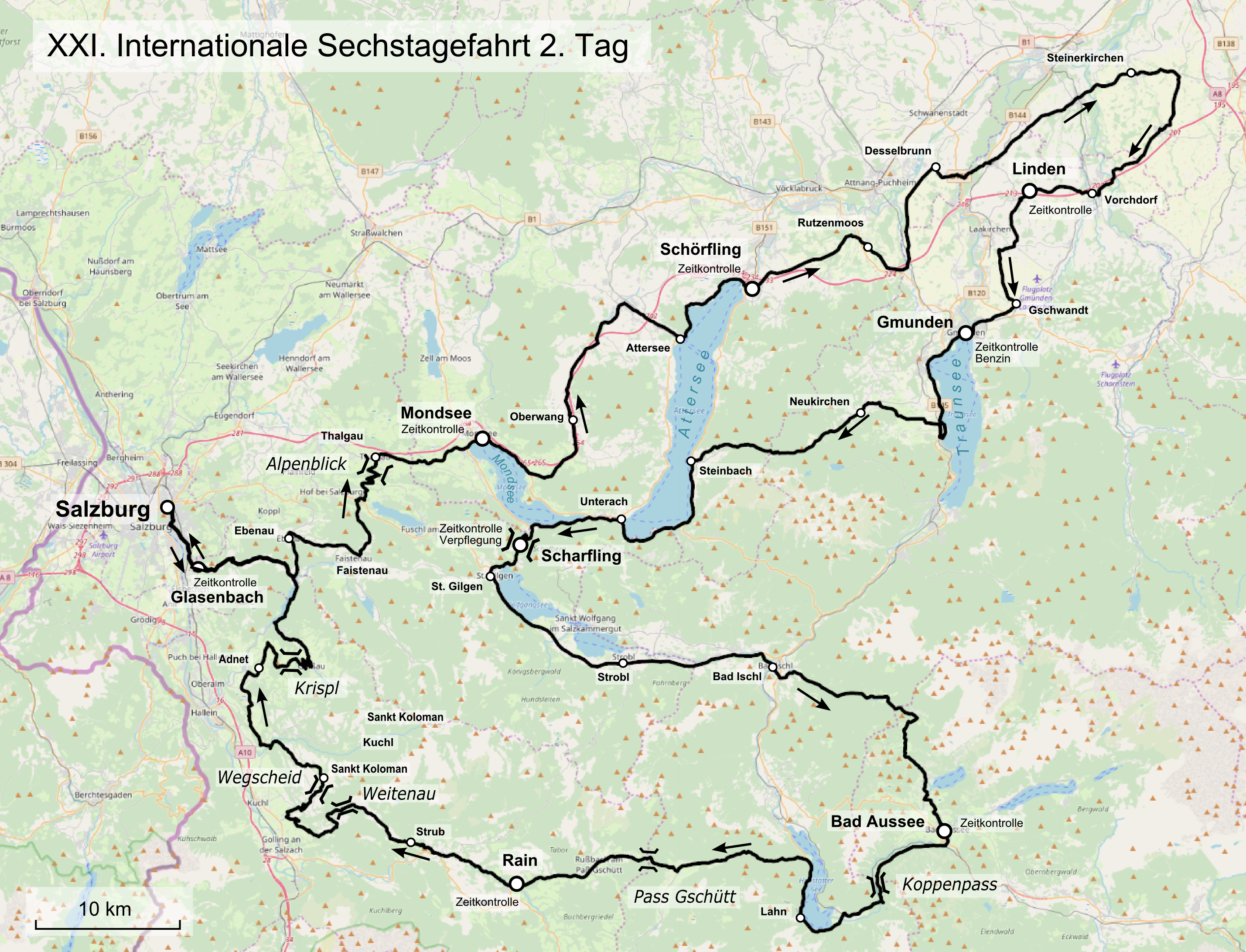 Karte der 21. Internationale Sechstagefahrt, Route des 2. Tages